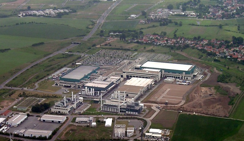 Luftbild der AMD Chipfabrik Dresden